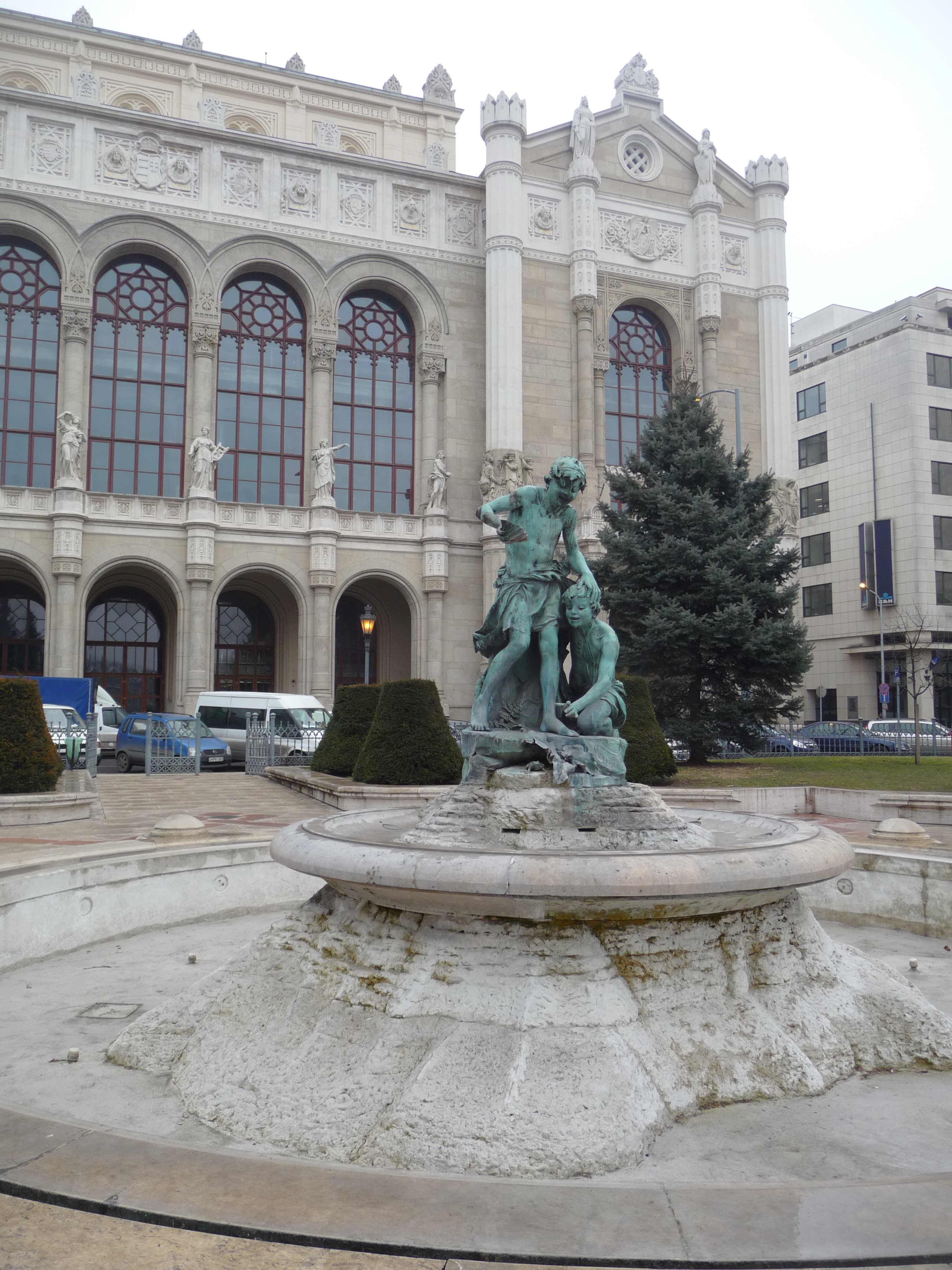 Senyei Károly: Vízcsorgató gyermekkút (bronz, 1896), háttérben a Vigadóval (Vigadó tér, Budapest)